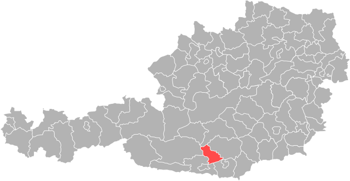 Bezirk Feldkirchen in Österreich